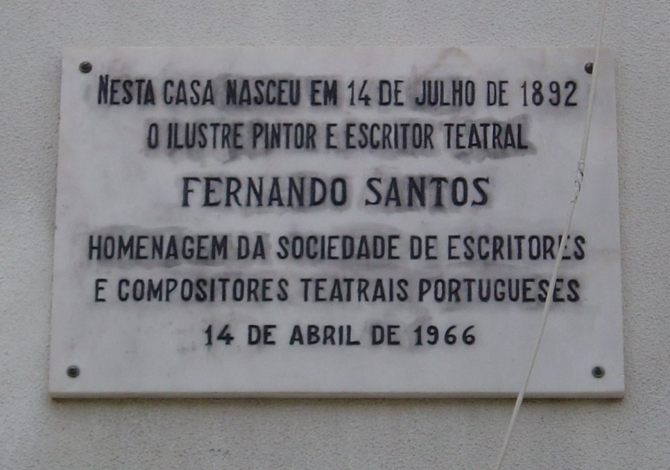 Placa colocada na casa onde nasceu Fernando Santos (n.º 15 do Largo de Santa Maria, em Setúbal)